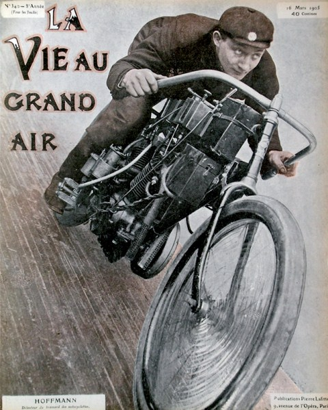 La Vie au grand air n° 340 du 16 mars 1905. Légende photo : Franz Hoffmann sur sa motocyclette.